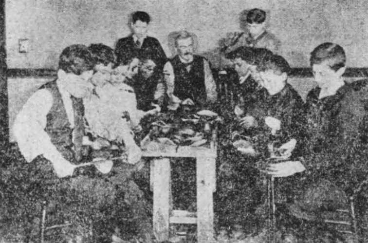 ハルハウスの製靴作業 小学校長団の観たる米国の教育 -東京市教育会 編 (佐藤出版部, 1920)